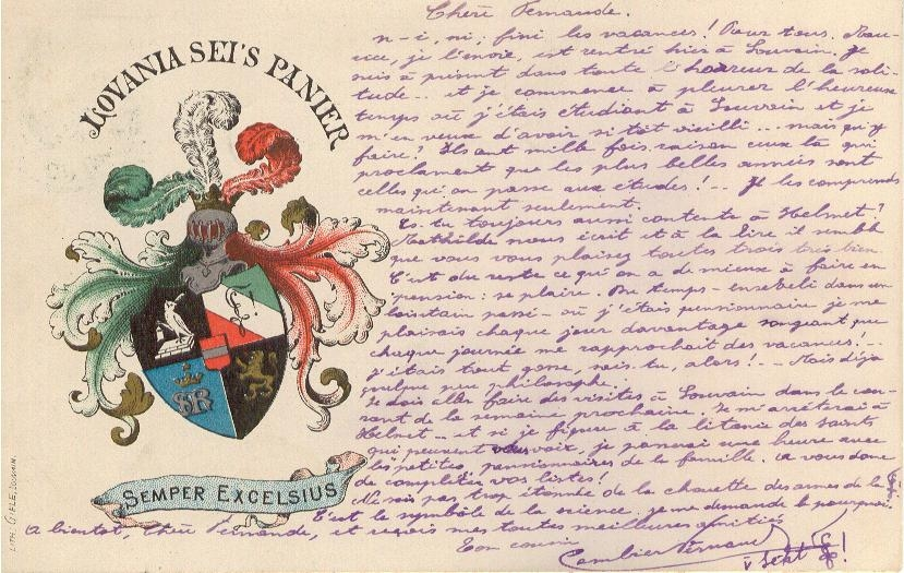 Couleurkarte van K.A.V. Lovania Löwen